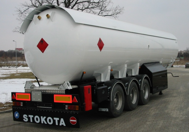 Полуприцеп-цистерна для транспортировки газа (СУГ)